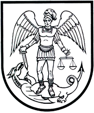 Herb miasteczka Klewań